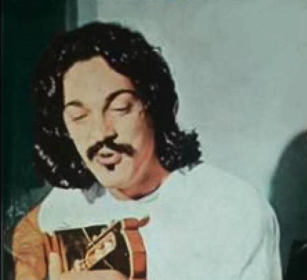 Foto de Toquinho, del disco "Vinicius Toquinho, Son Demasiados los Peligros"